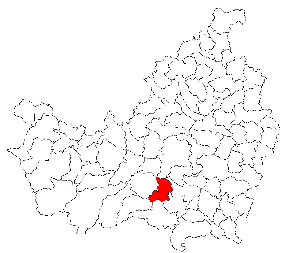 Categorie:Hărţi ale judeţului Cluj